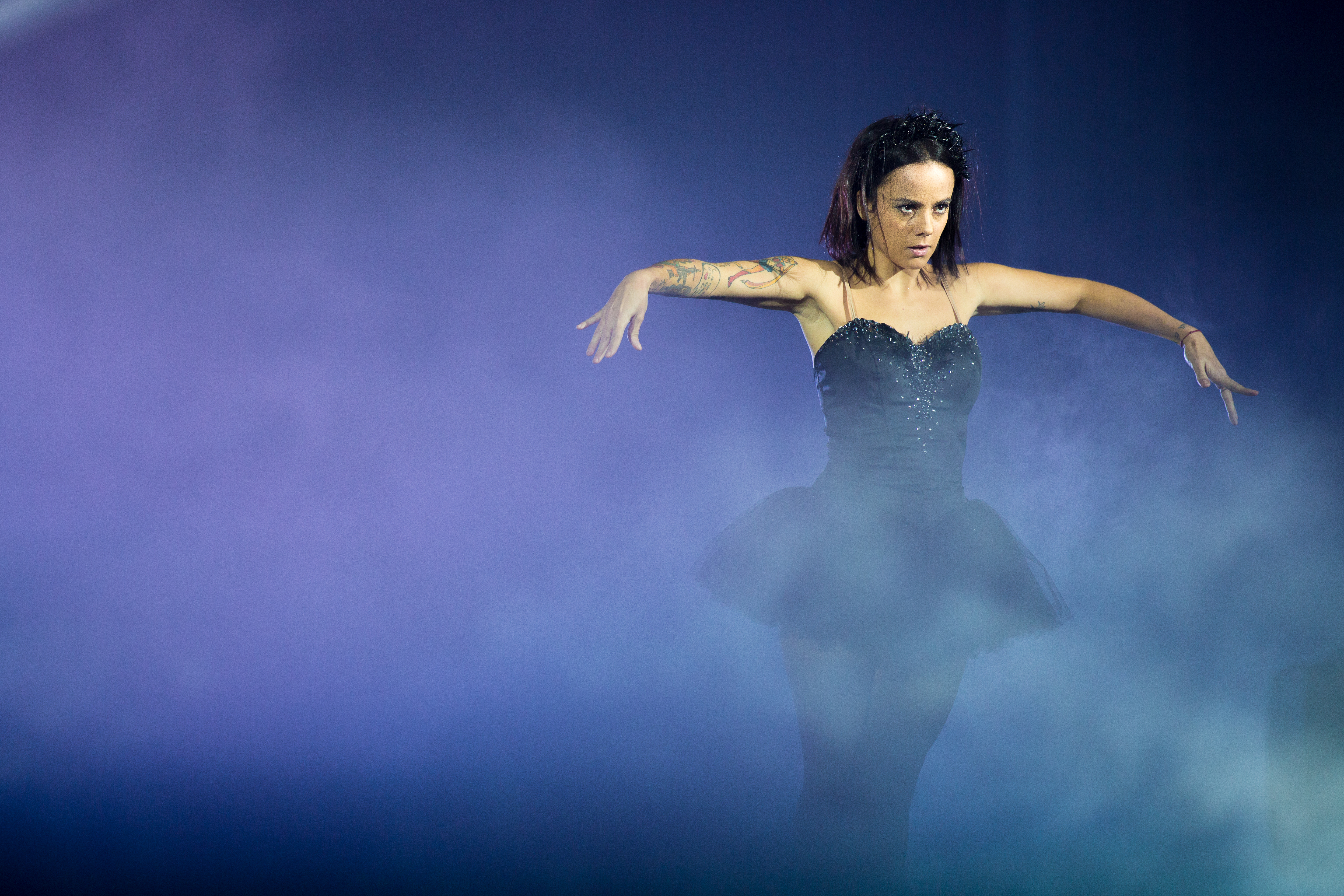 Alizée au Galaxie d’Amnéville – Danse avec les stars du 8 février 2014